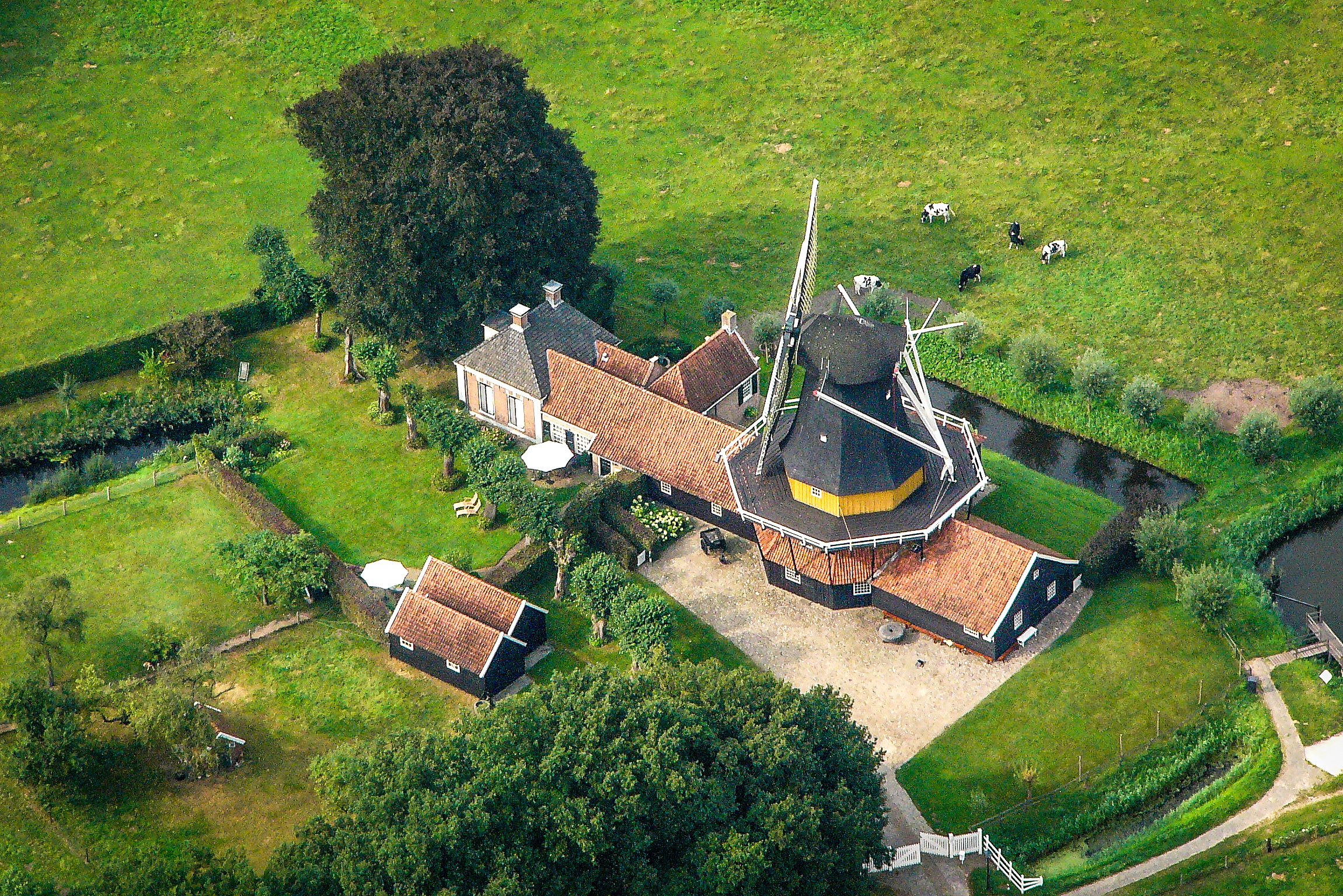 Pelmolen Ter Horst Rijssen luchtfoto 7 september 2005